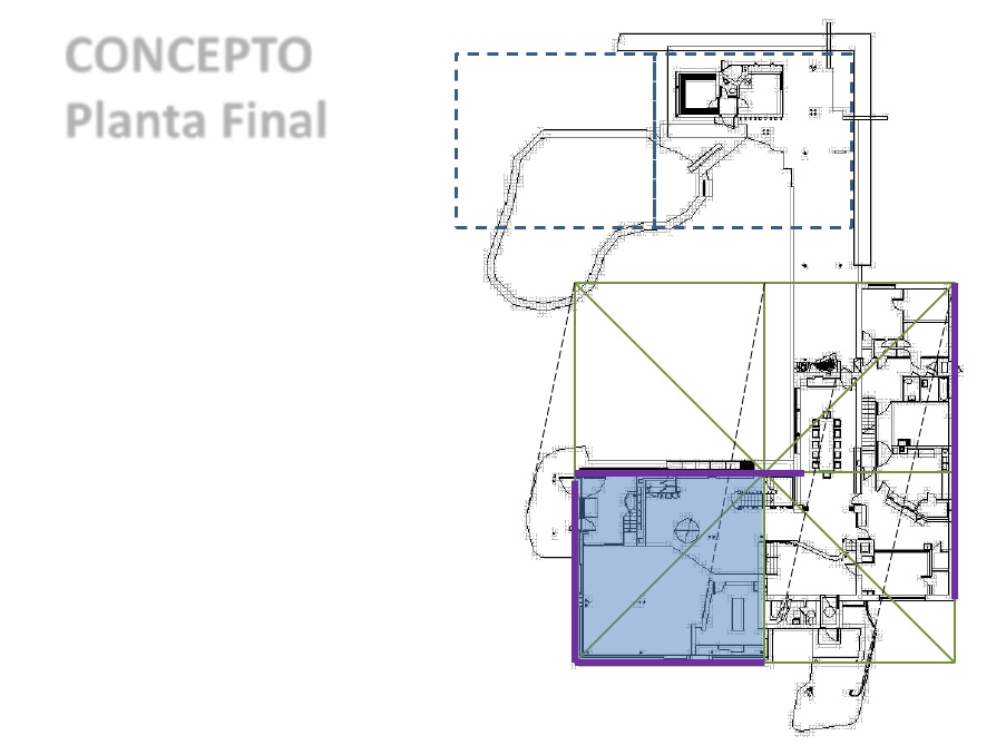 Distribucion de espacios